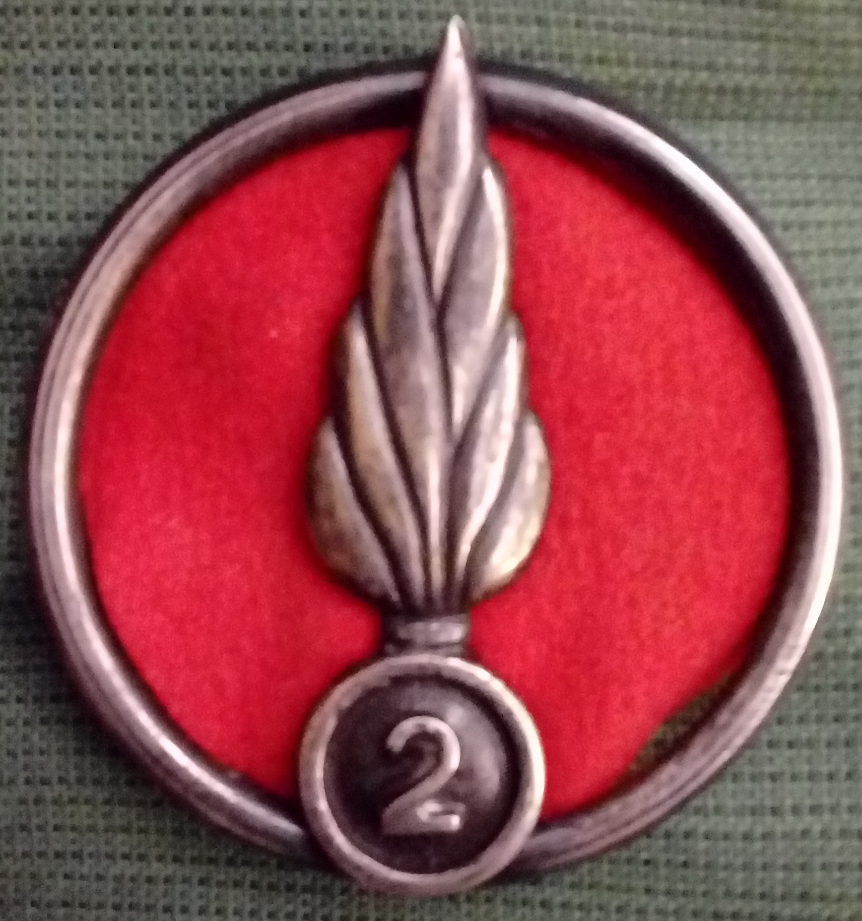 Fregio da Basco per Comandante del Reggimento Piemonte Cavalleria